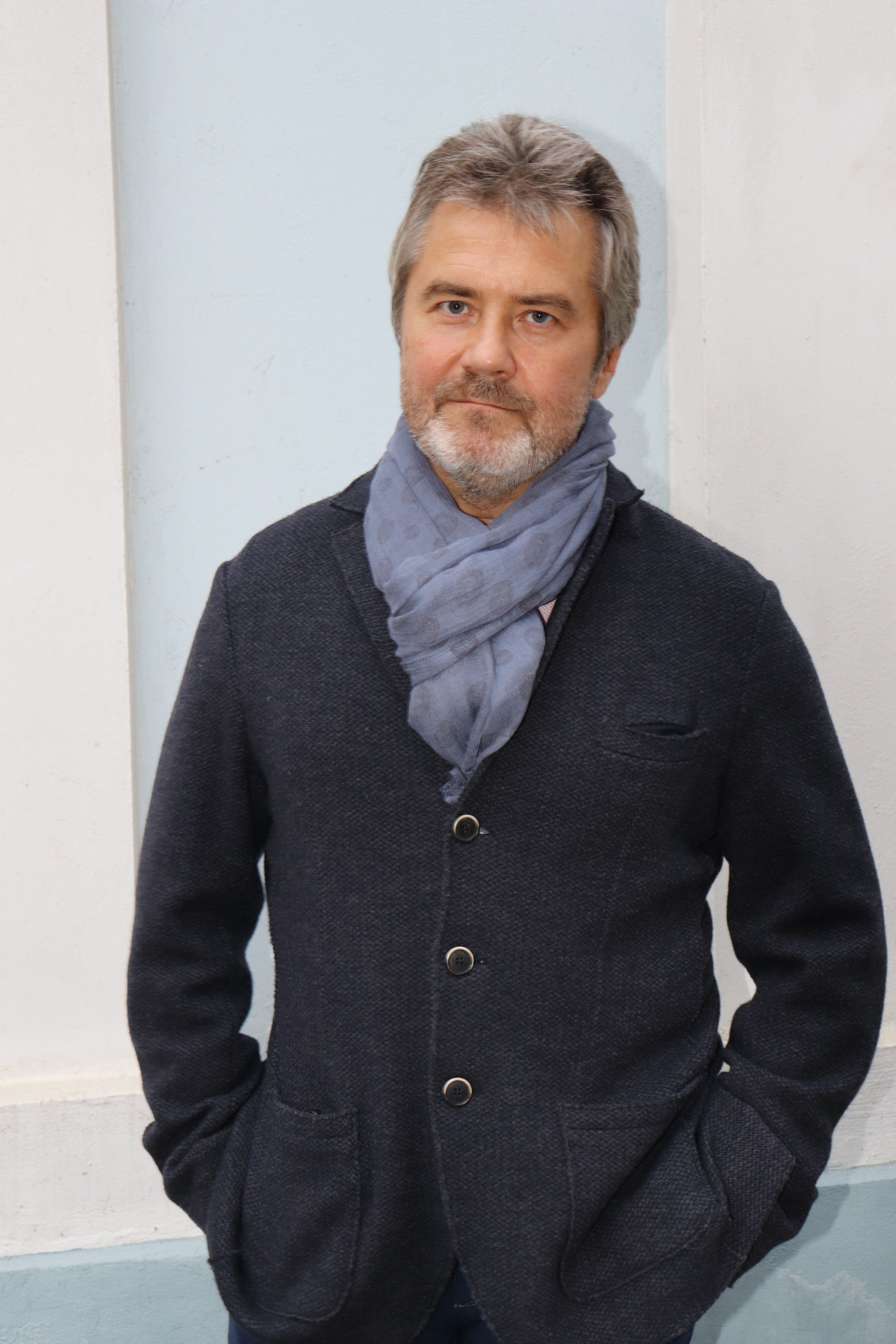 фотопортрет Аренева К.Б., Москва, 18.10.2019, Арбат